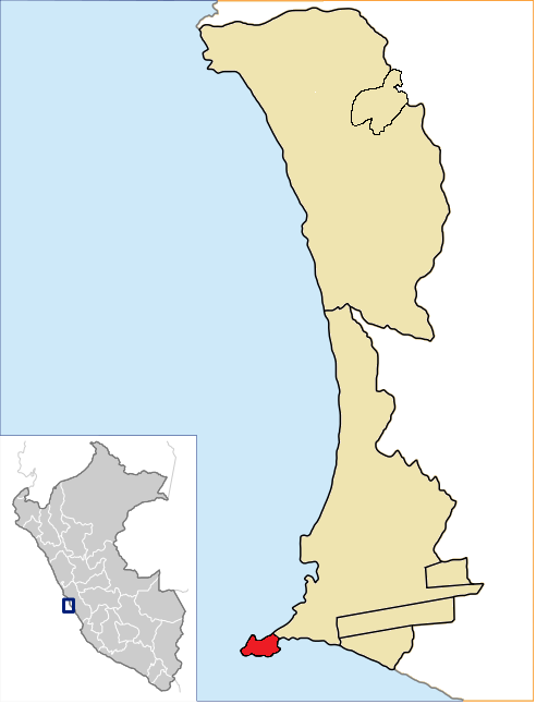 La Punta